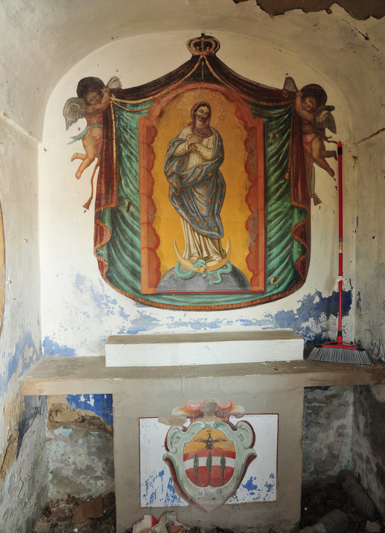 Madonna 5 Strade3